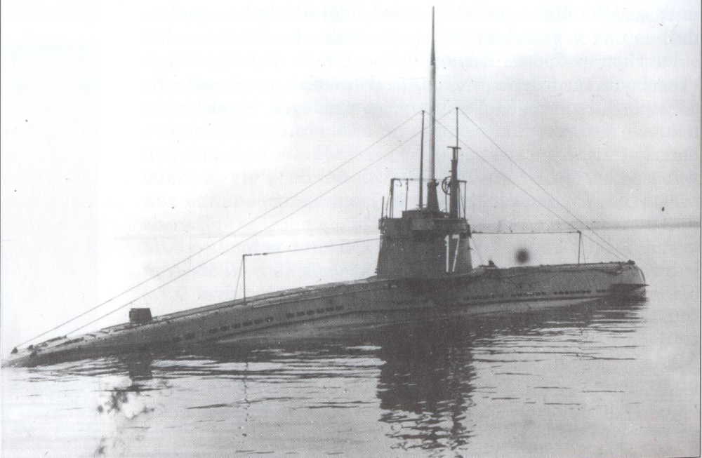 K.u.K. U-Boot SM U-17 nach seiner Indienststellung